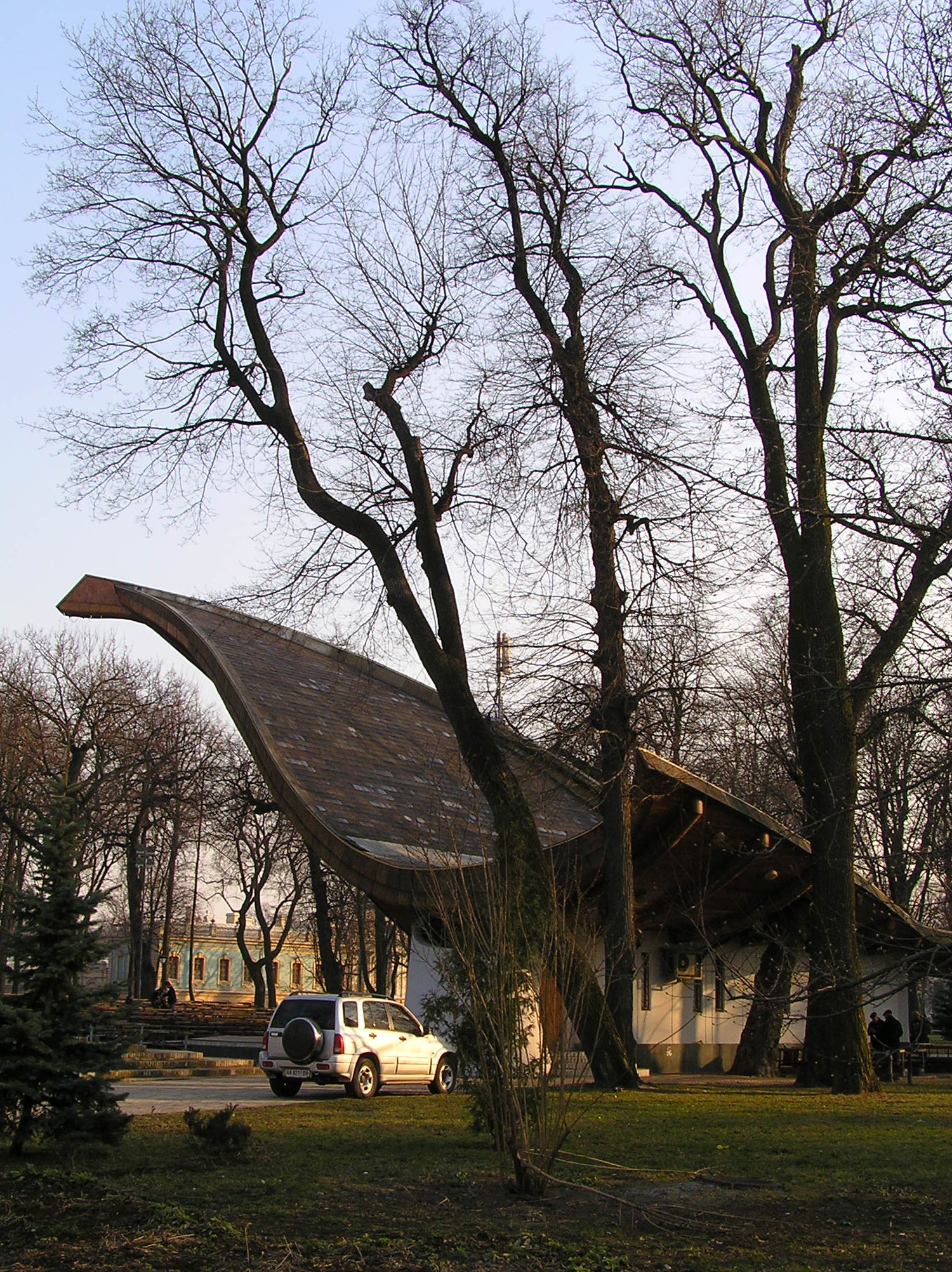 "Міський сад" - парк-пам'ятка садово-паркового мистецтва, вул. Грушевського, м.Київ.